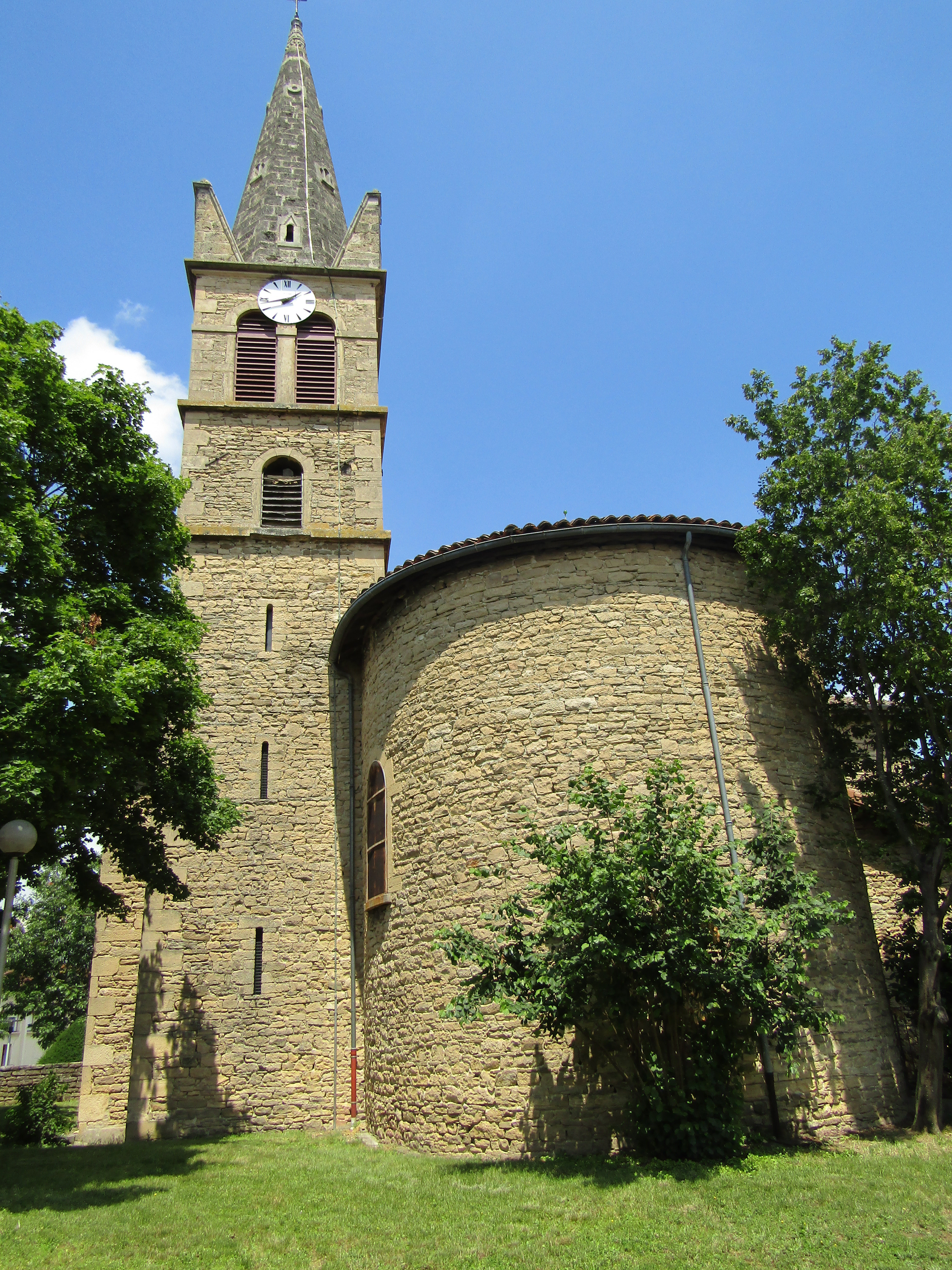 Église de Nivolas-Vermelle (vue arrière)